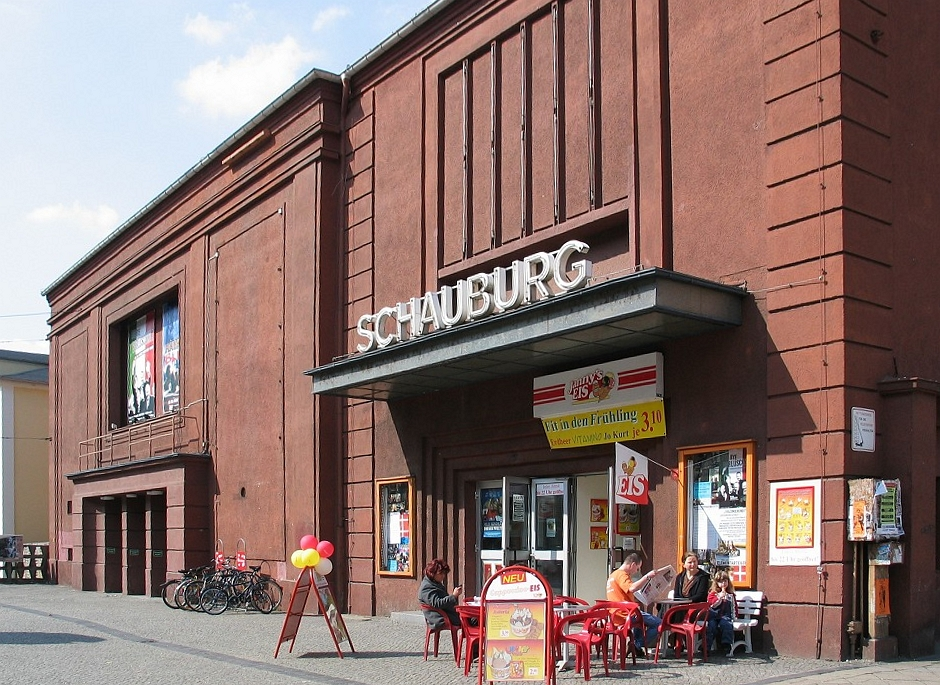 Das Kino Schauburg in Dresden.